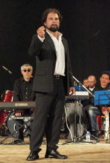 Fabrizio Careddu